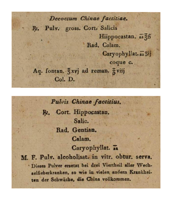 Rezepte zum Ersatz für die Fieberrinde (Cinchona)